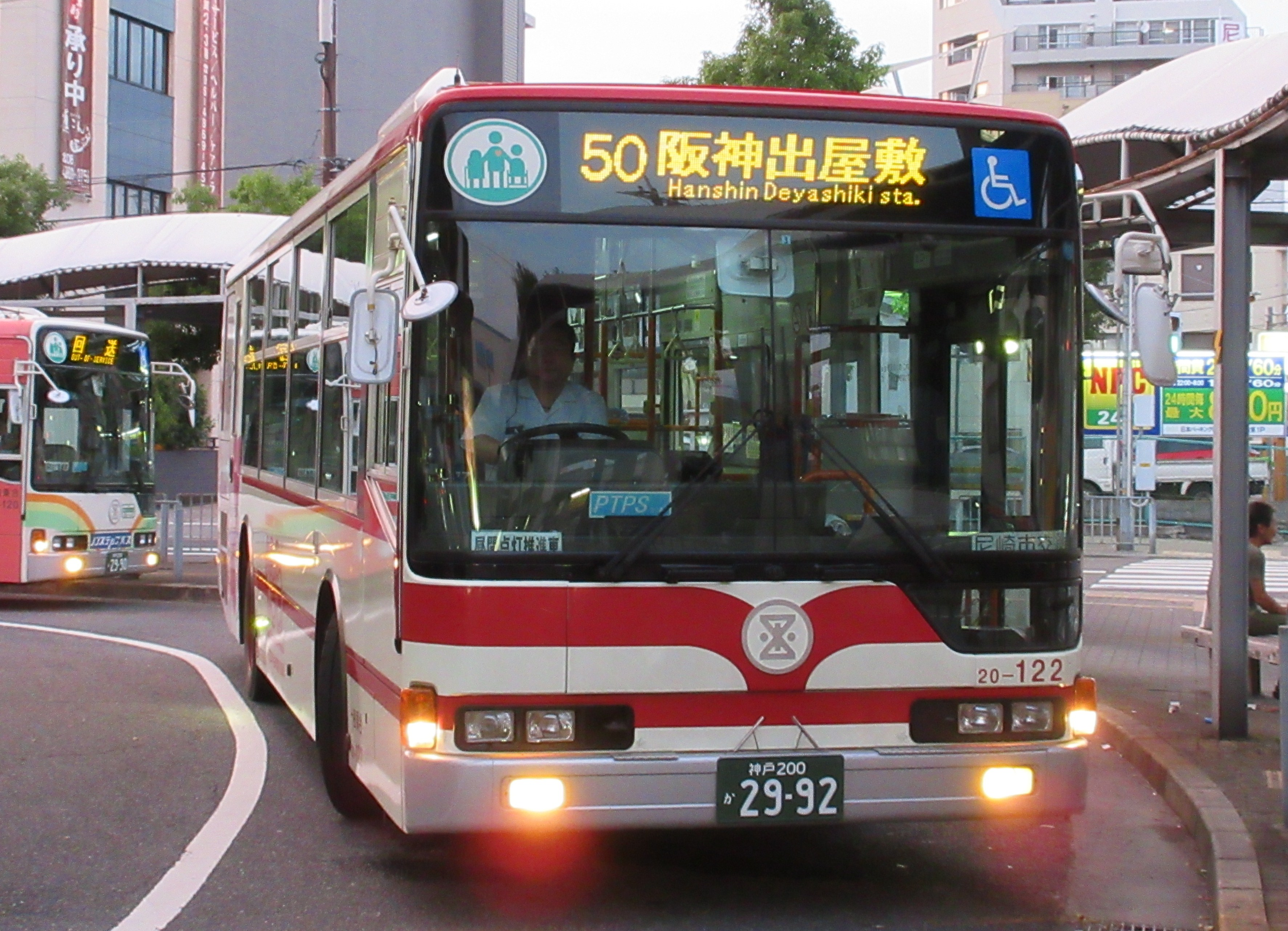 尼崎市営バス20-122(出屋敷駅にて)